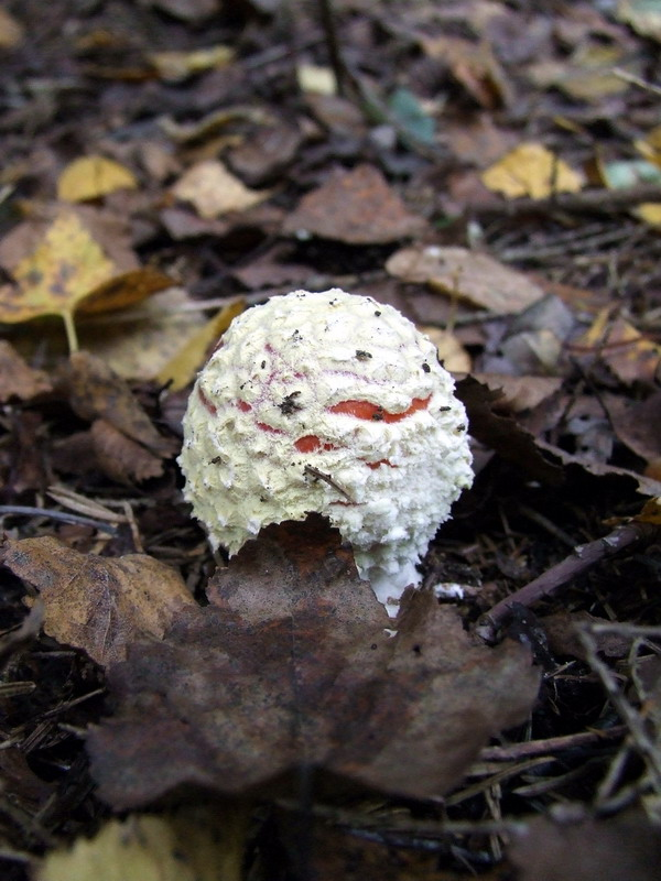 Amanita muscaria. Karmėlava forest, Lithuania.